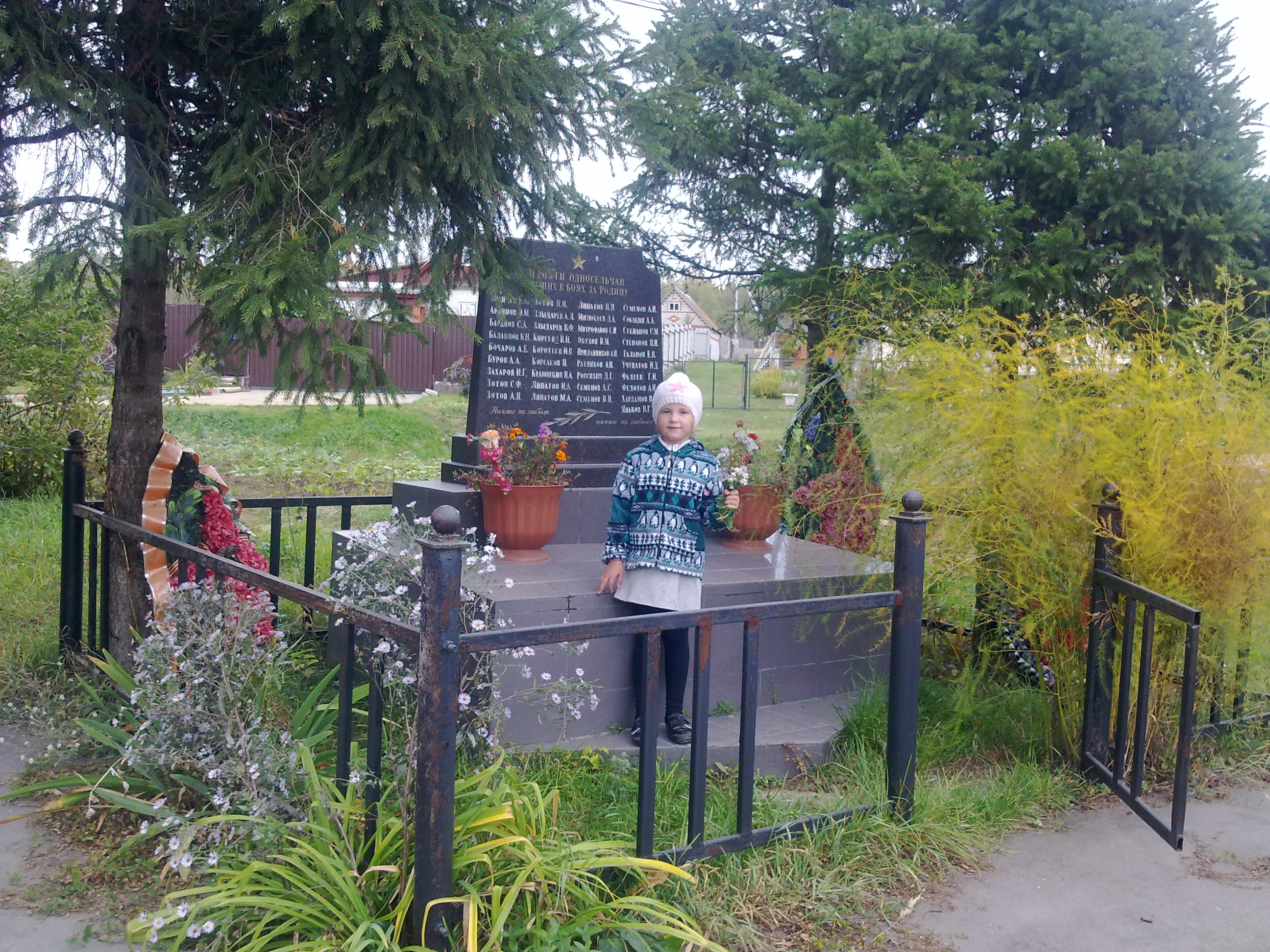 Памятник односельчанам. Обновлен в деревне Губастово, Коломенской области в 2011 г.